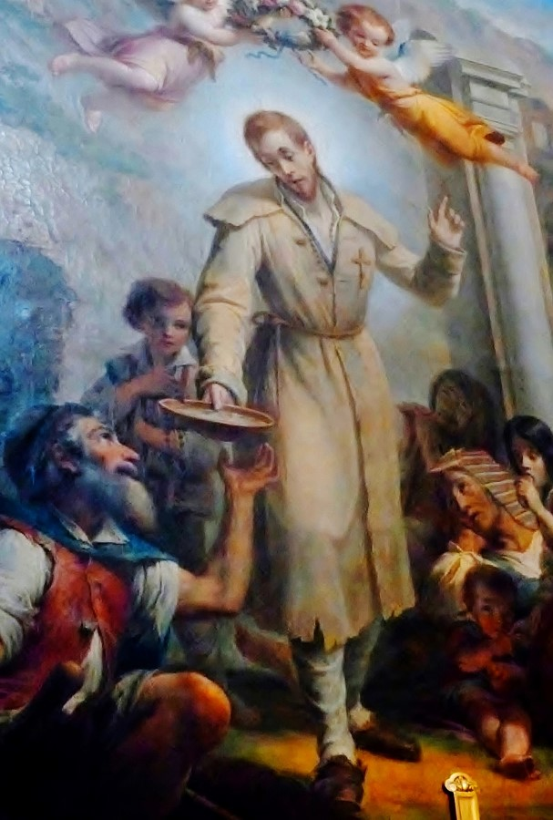 Tableau de St Benoit Joseph Labre - Eglise Sainte Marie des Monts à Rome